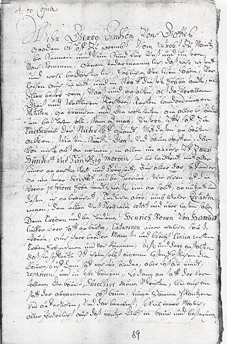 Georg Anton von Rodenstein (1579-1652), Bischof von Worms, Pachtbrief für ein Gut des Hochstiftes in Immesheim, 1651